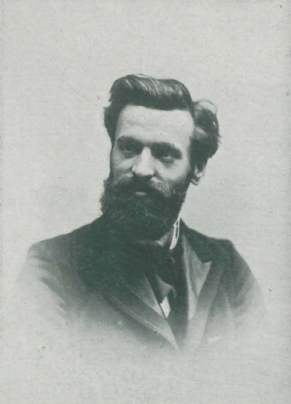 Fotografía de Antonio Ros y Güell realizada por Pau Audouard.